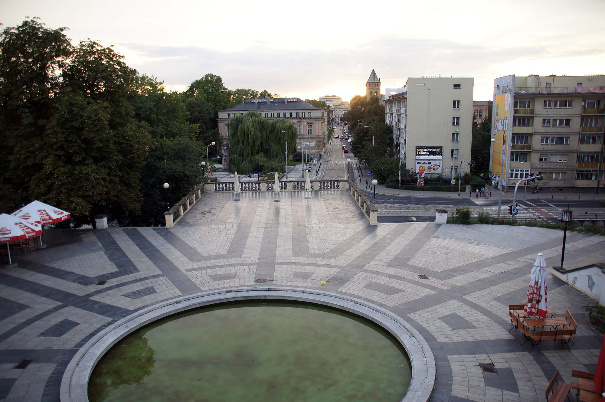 Wrocław, Bastion Sakwowy, tzw. Wzgórze Partyzantów, XIV, XVI, XIX